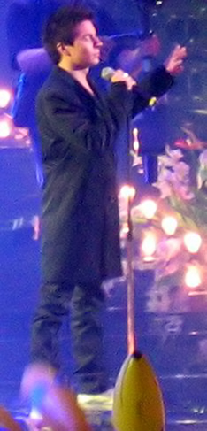 Antti Tuisku in Hartwall Arena 14.9.06